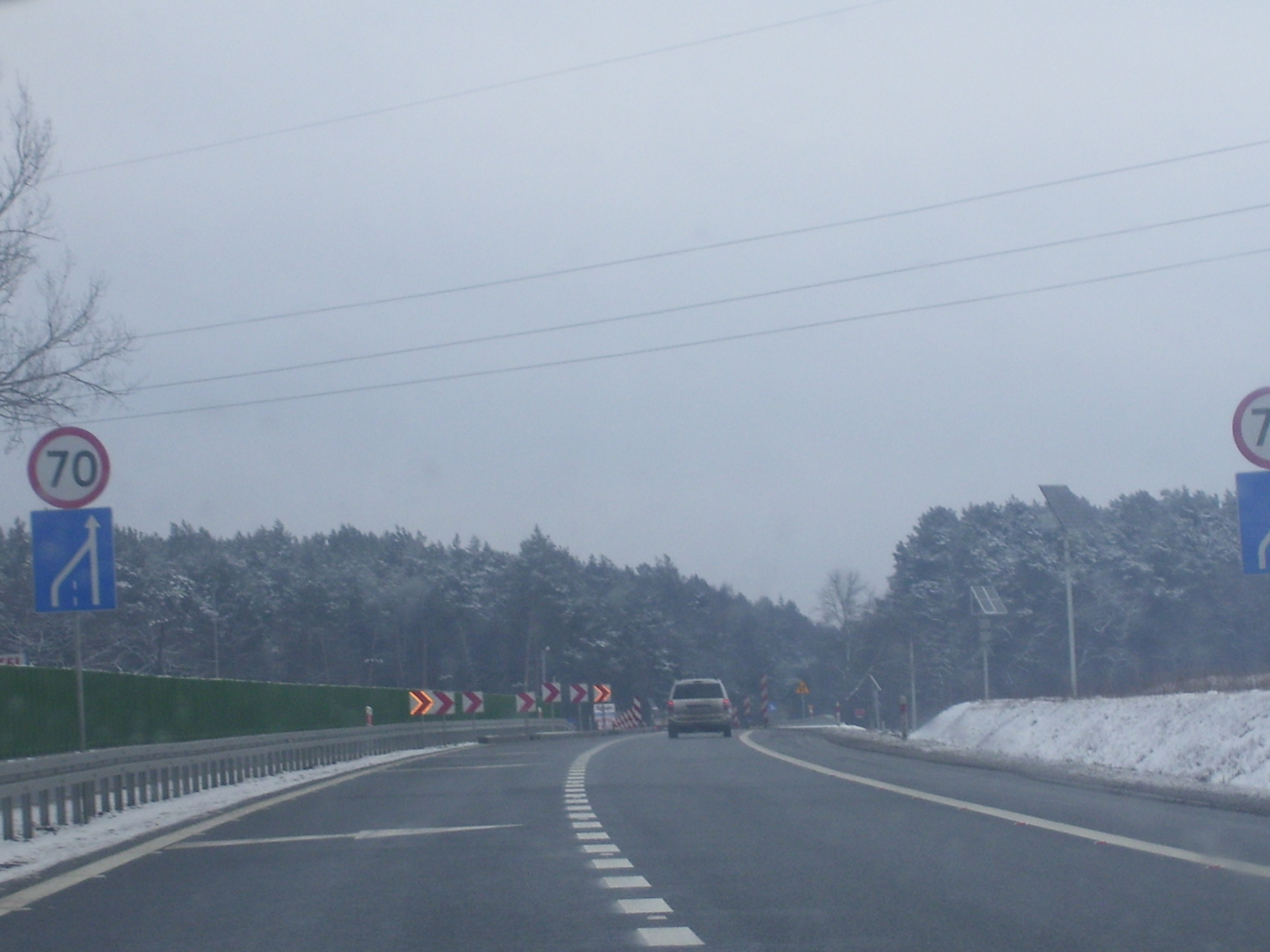 Koniec obwodnicy Wyszkowa